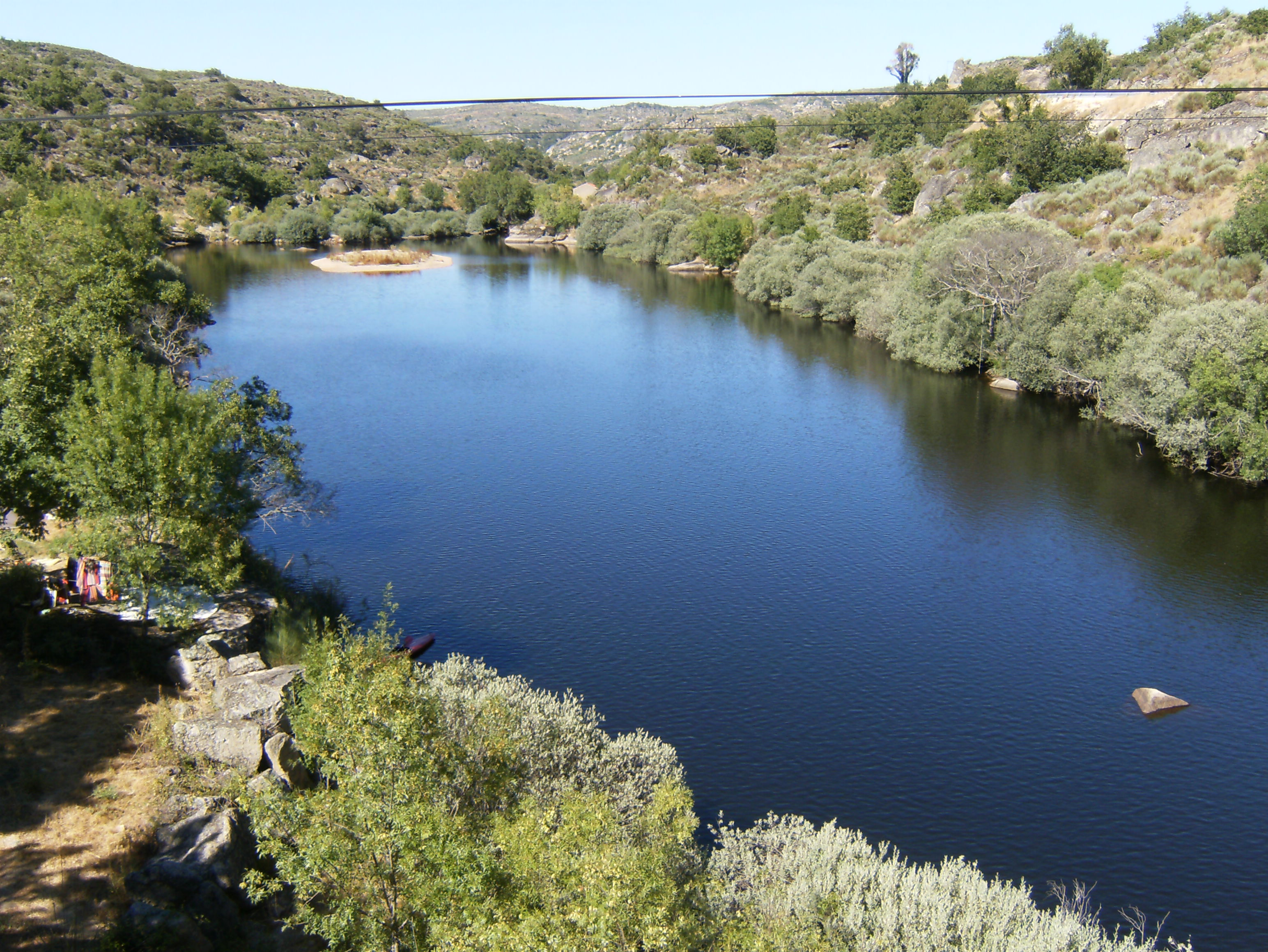 Rio Côa junto à Ponte de São Roque (Castelo Bom, Almeida)